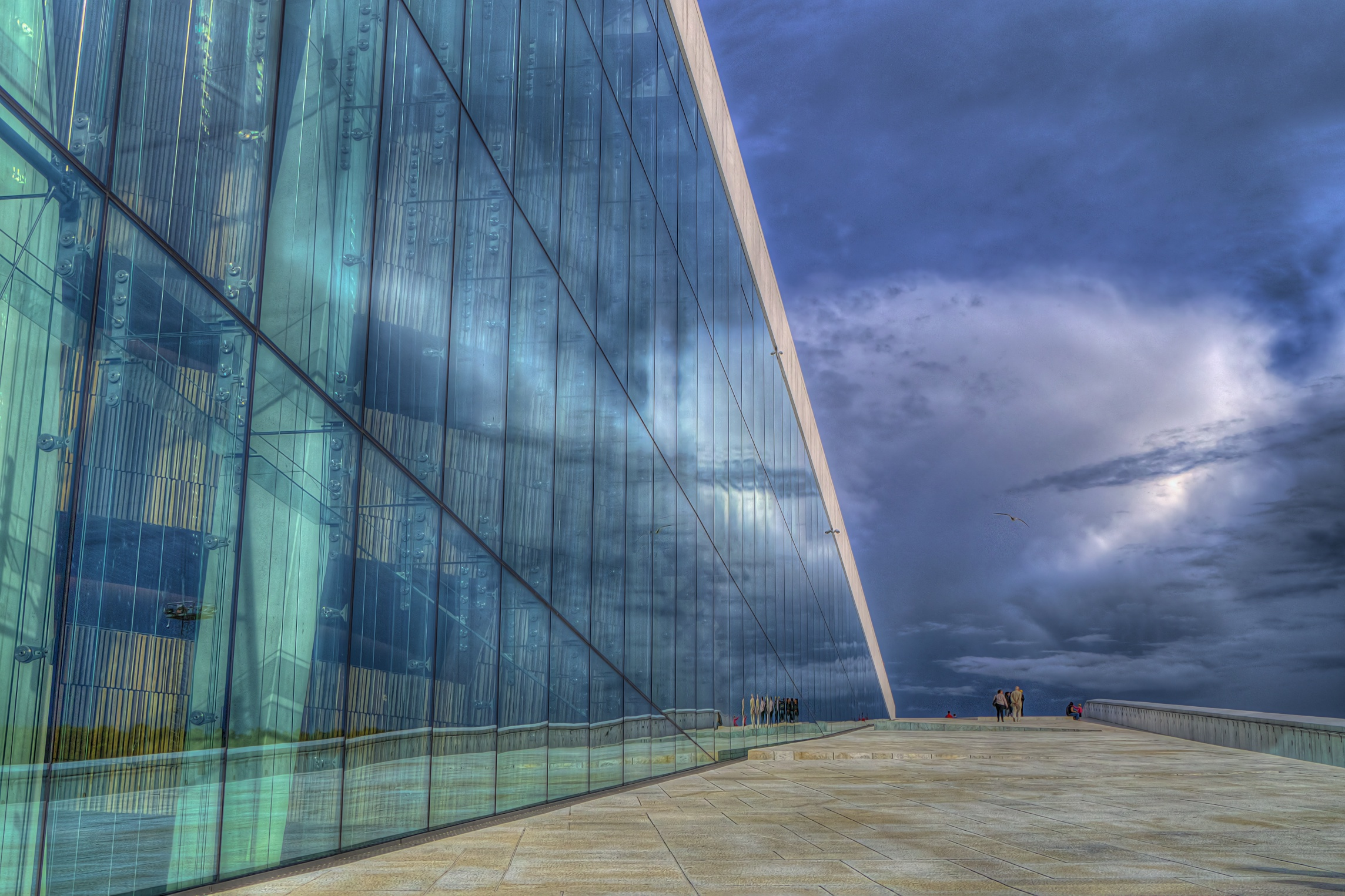 Opernhaus Oslo